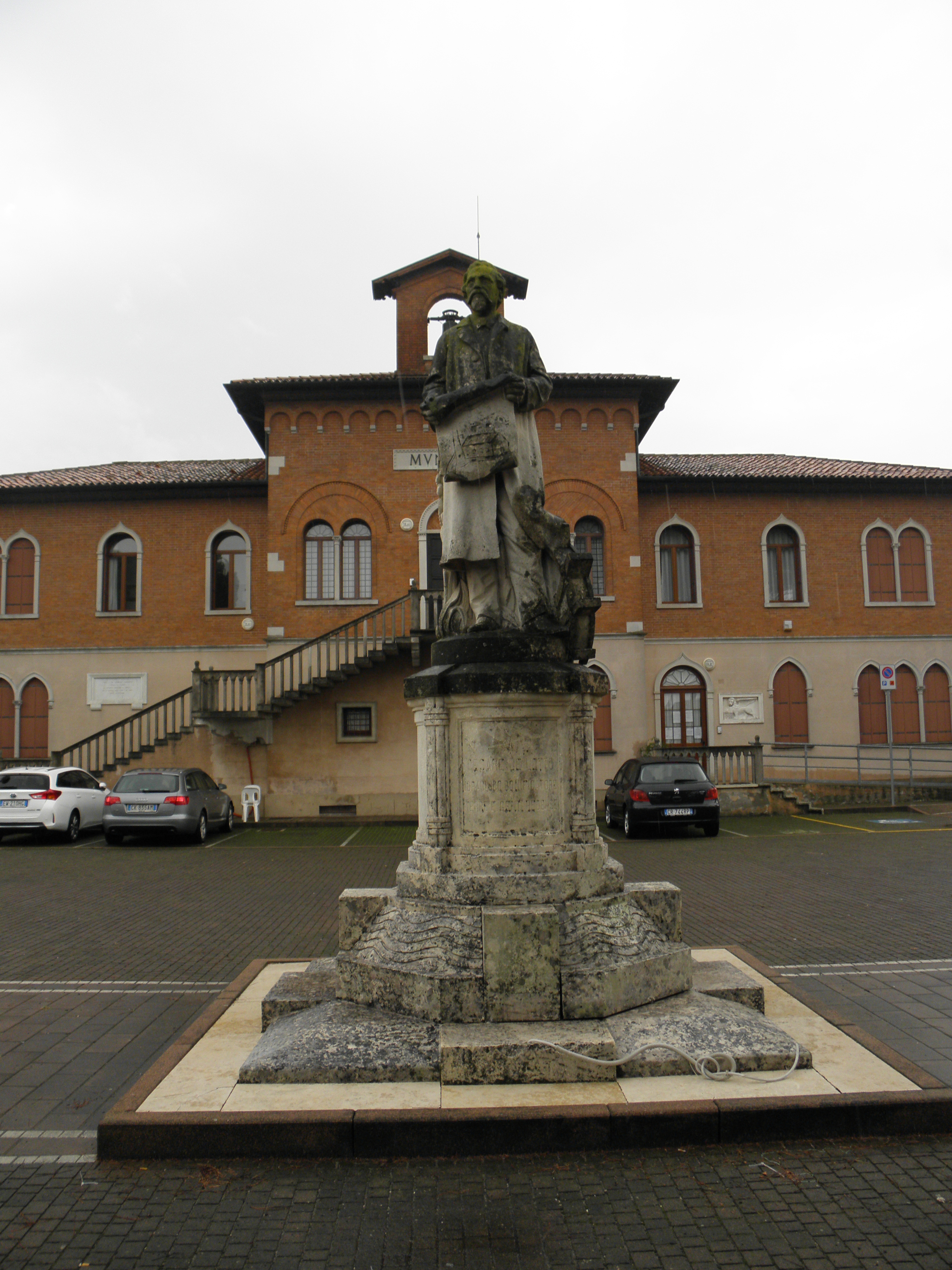 Pegolotte, frazione e sede comunale del comune sparso di Cona: il monumento a Cesare De Lotto, sito nell'omonima piazza antistante alla palazzina municipale.